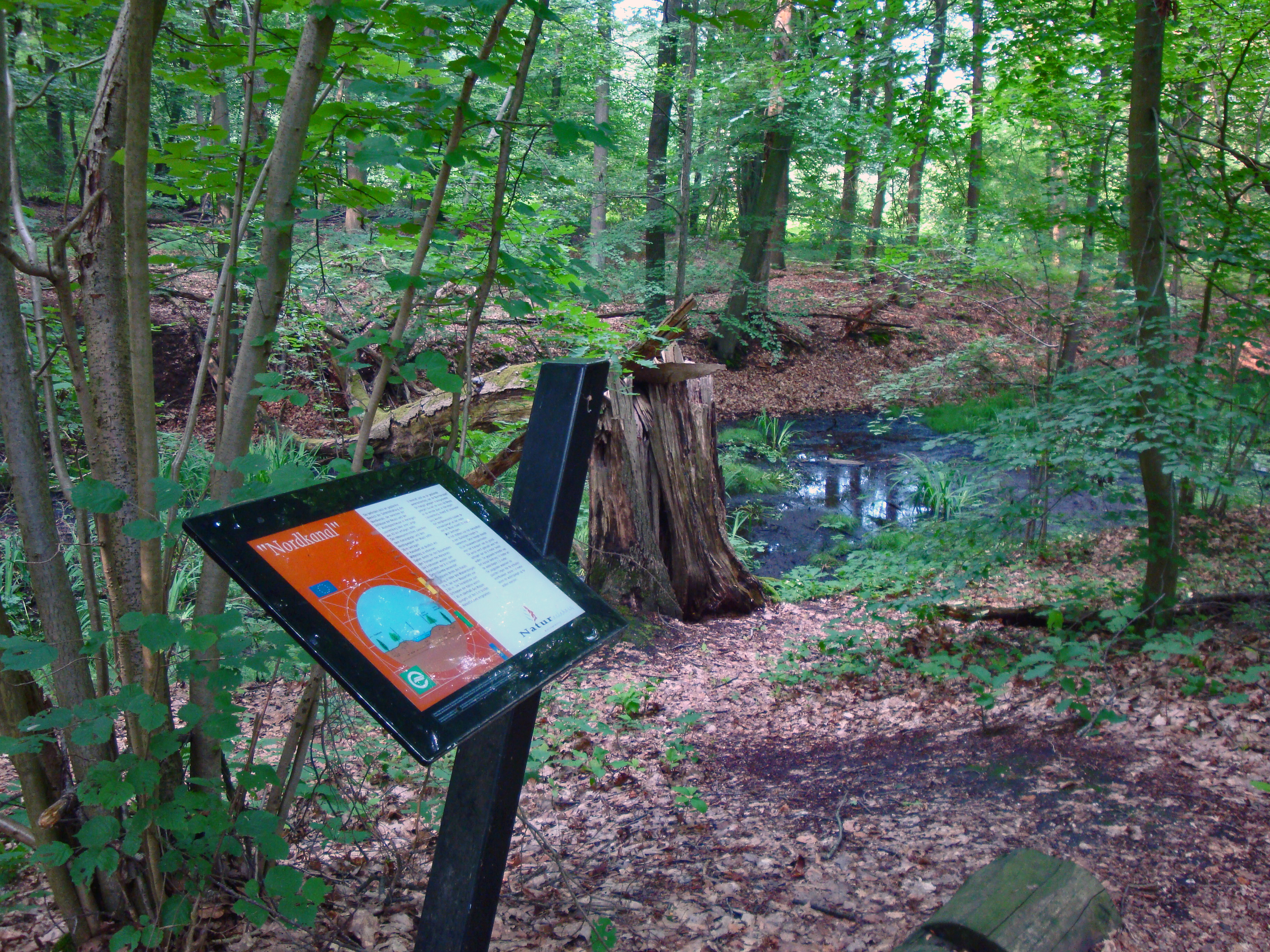 Bodendenkmal Nordkanal, Glabbacher Bruch, Nettetal